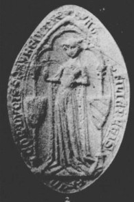 Sceaux de Agnes of France (1260-1325)